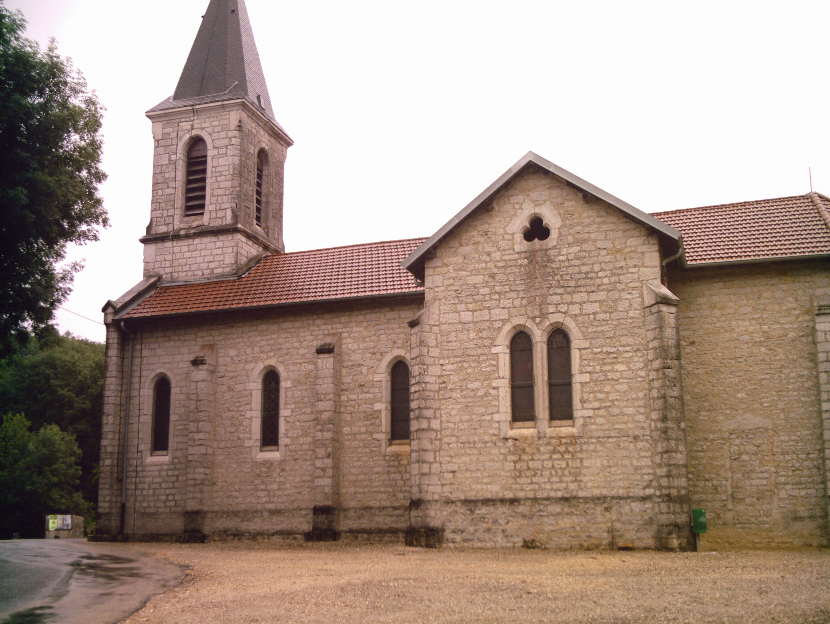 L'église de Ceignes (Ain, FRANCE)